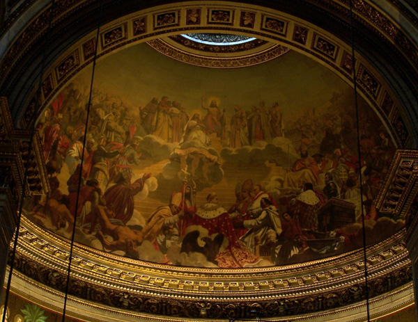 Coupole de l'église de la Madeleine à Paris - peinture réalisée par Jules-Claude Ziegler (1835-1838)